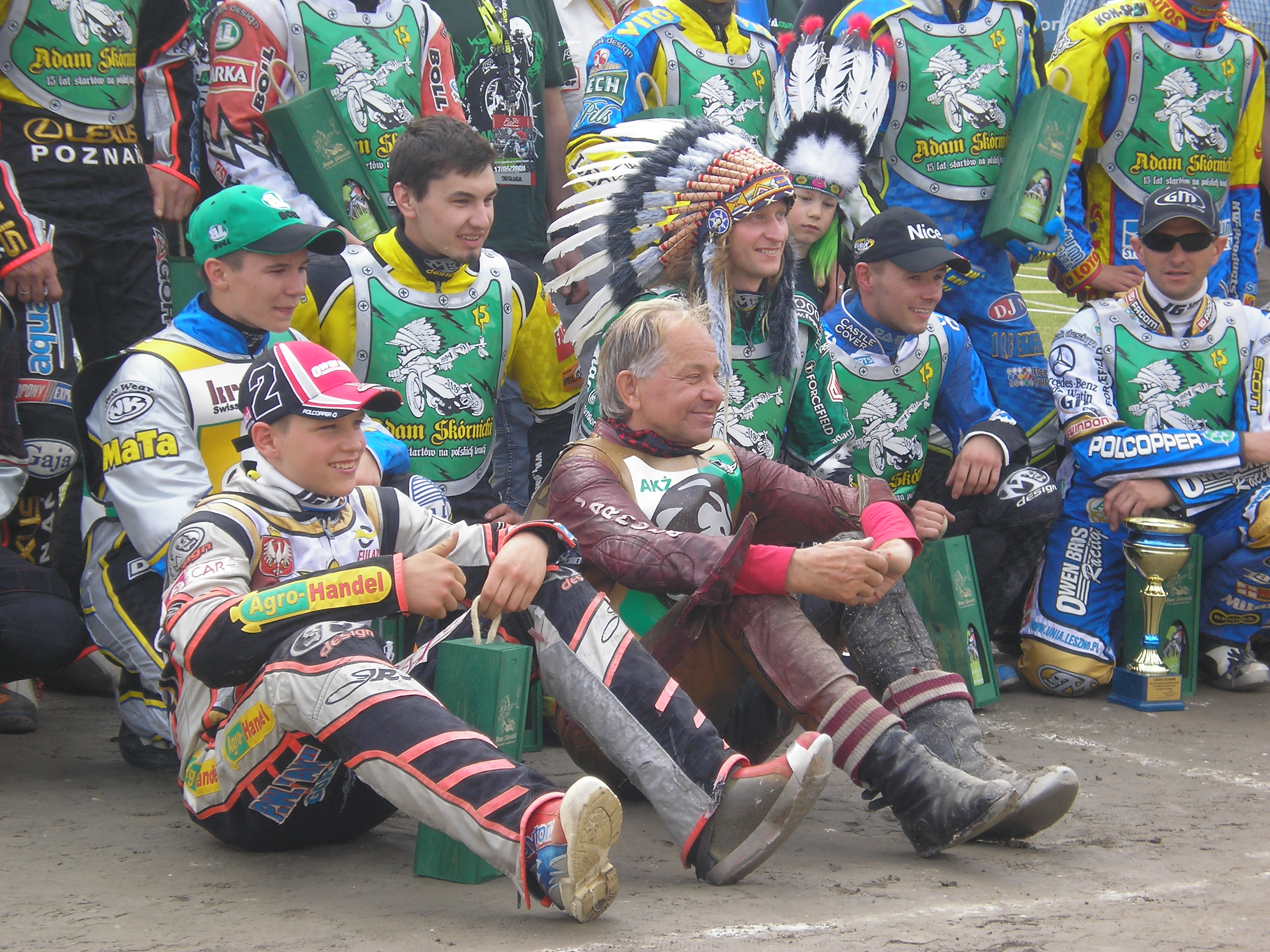 Pamiątkowe zdjęcie Adam Skórnicki i Józef Jarmuła